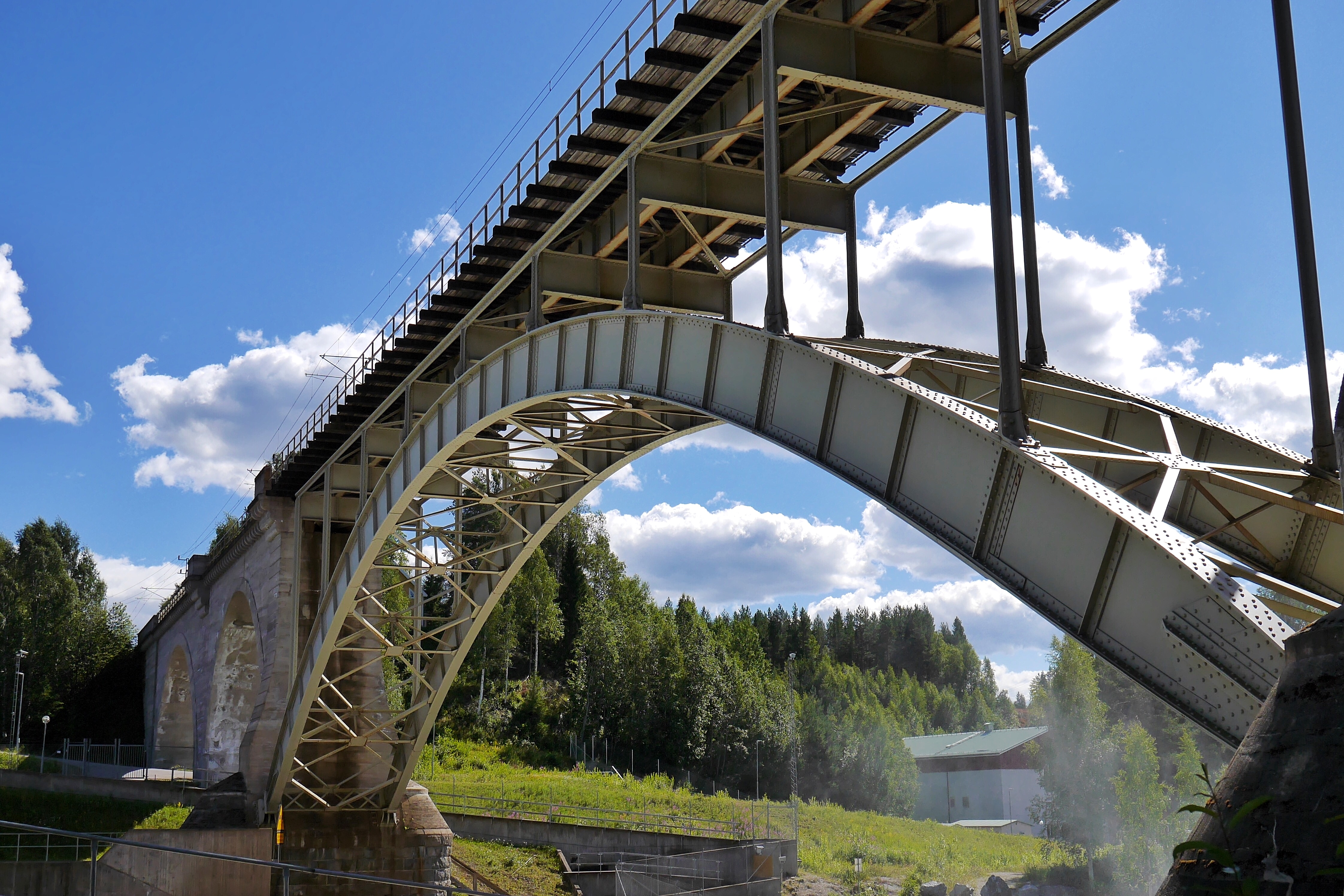 Järnvägsbron över Piteälven vid Sikfors (Sikfors 100:8). Bron byggdes 1911-1912 och togs i bruk 1914. Brons hela längd är 155 meter. Den har fyra spann och spannens spännvidd är 15+58,3+20+24 meter. Detta är ett foto av en svensk skyddad bebyggelse, anläggning nummer 21300000024811 i RAÄ:s bebyggelseregister (BBR).